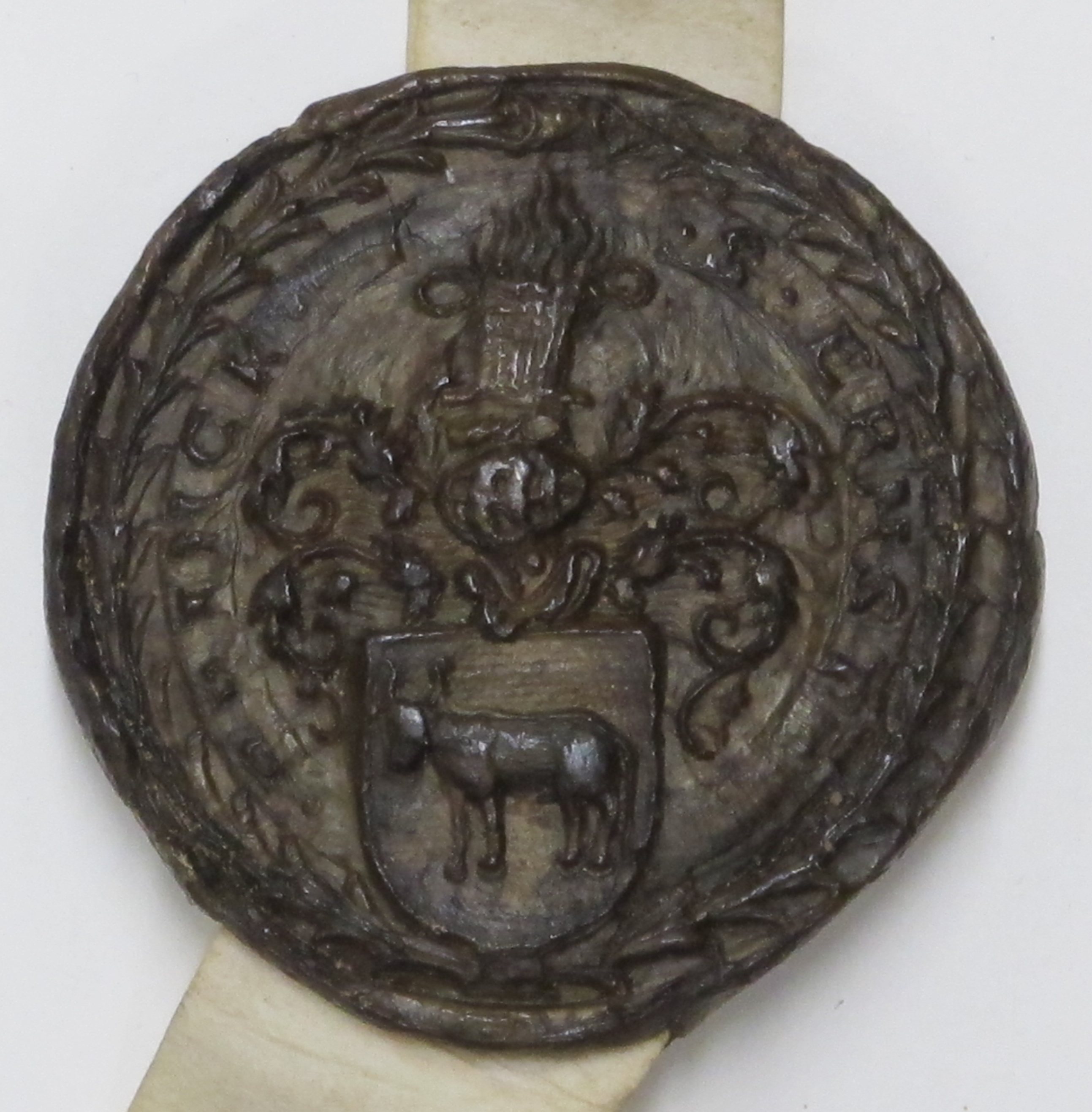 Zegel Etrnst Brinck